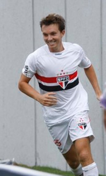 Dagoberto em ação no São Paulo Futebol Clube em 2010